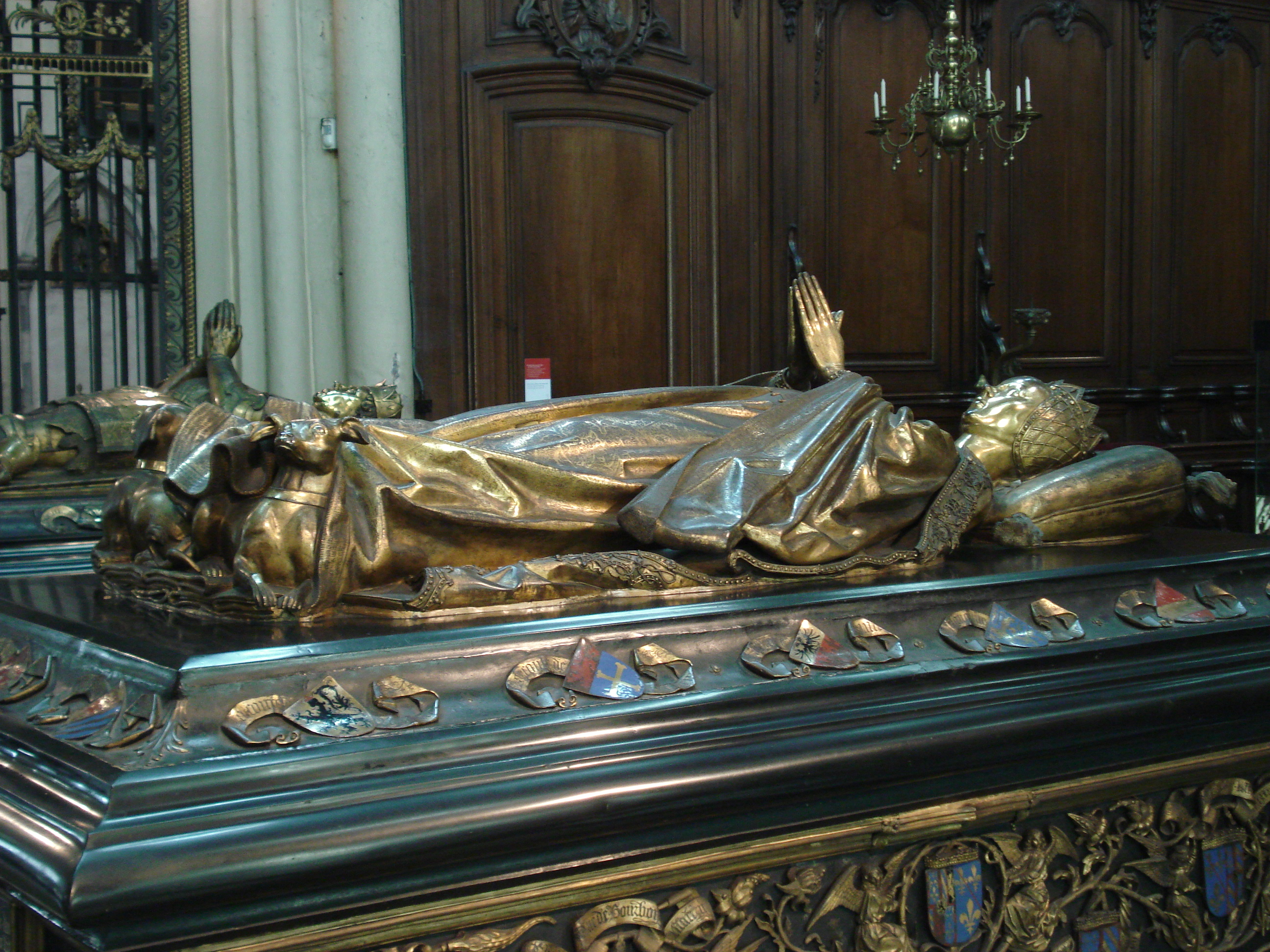 Tumba de María de Borgoña, en la iglesia de Nuestra Señora (Brujas, Bélgica)